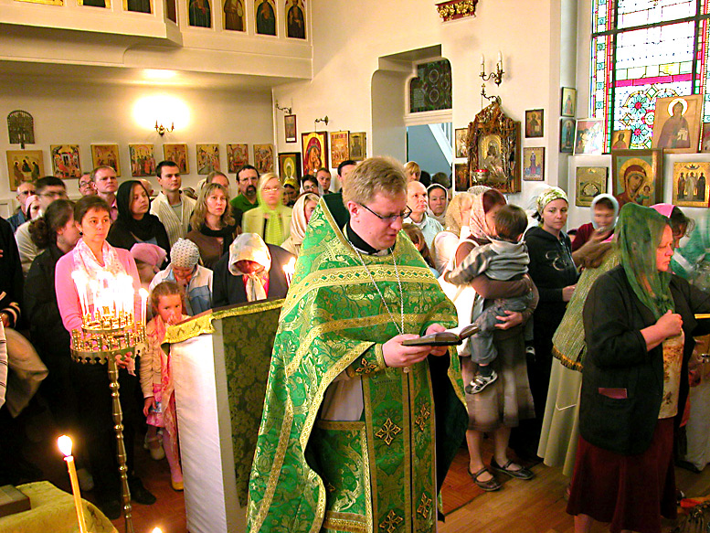 Fest für Petrus und Paulus in Russische Orthodoxe Kirche (Düsseldorf), 2009 ru: Праздник Петра и Павла в русской православной церкви Дюссельдорфа, 2009.